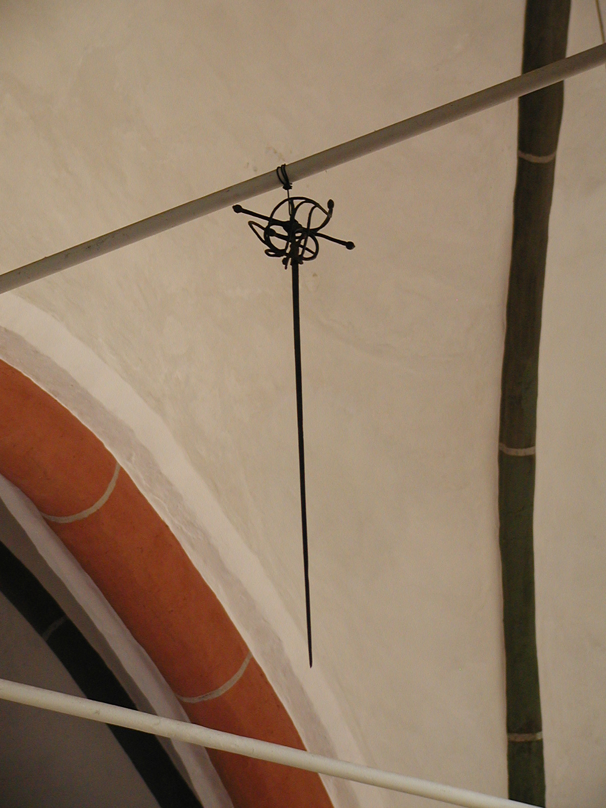 Der sagenumwobene Degen